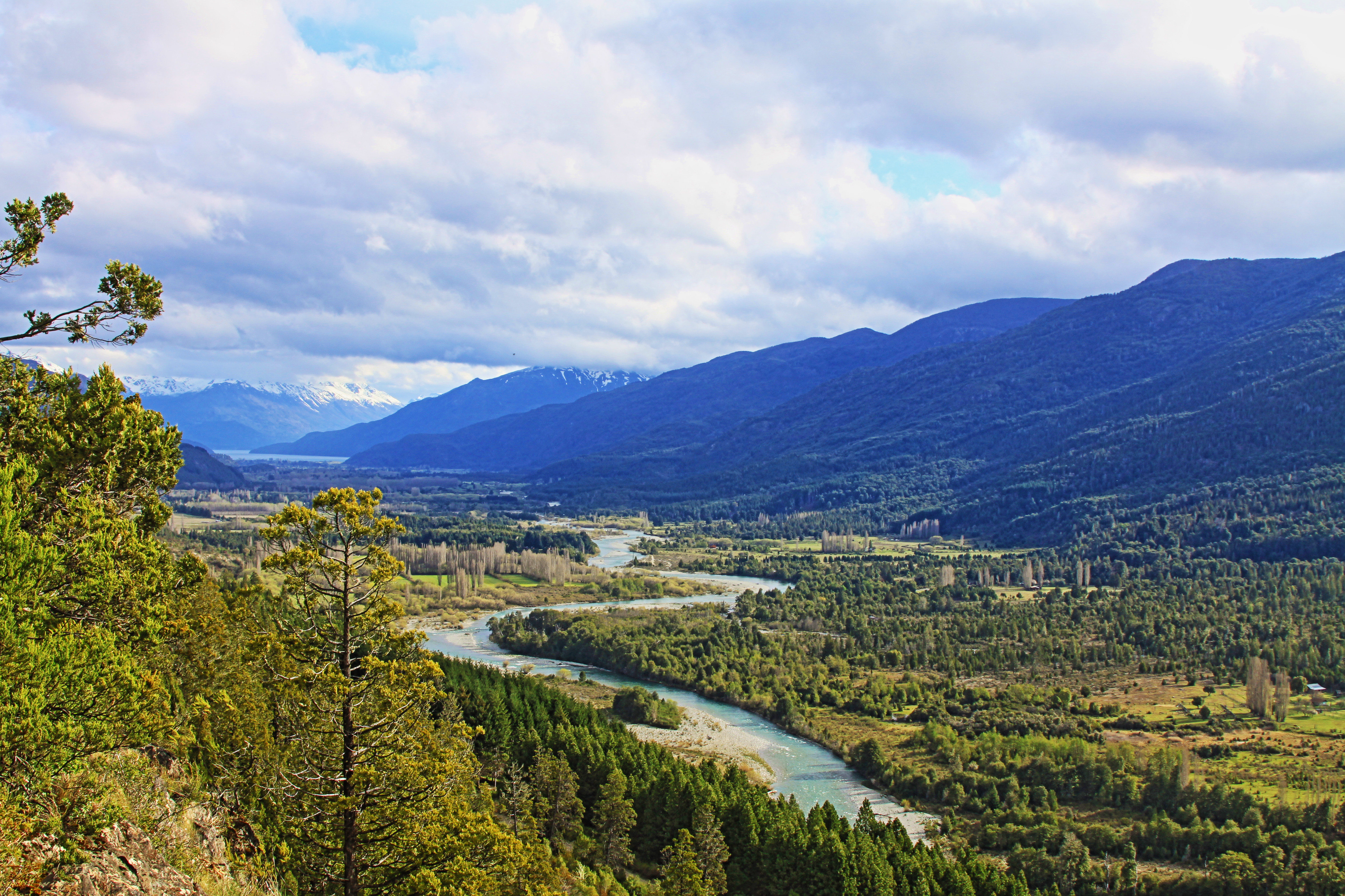 Rio Azul pasando por El Bolson, al fondo se puede ver el lago Puelo.